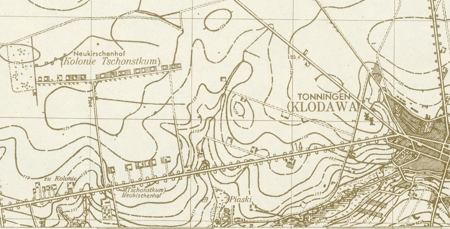 Cząstków 1944r